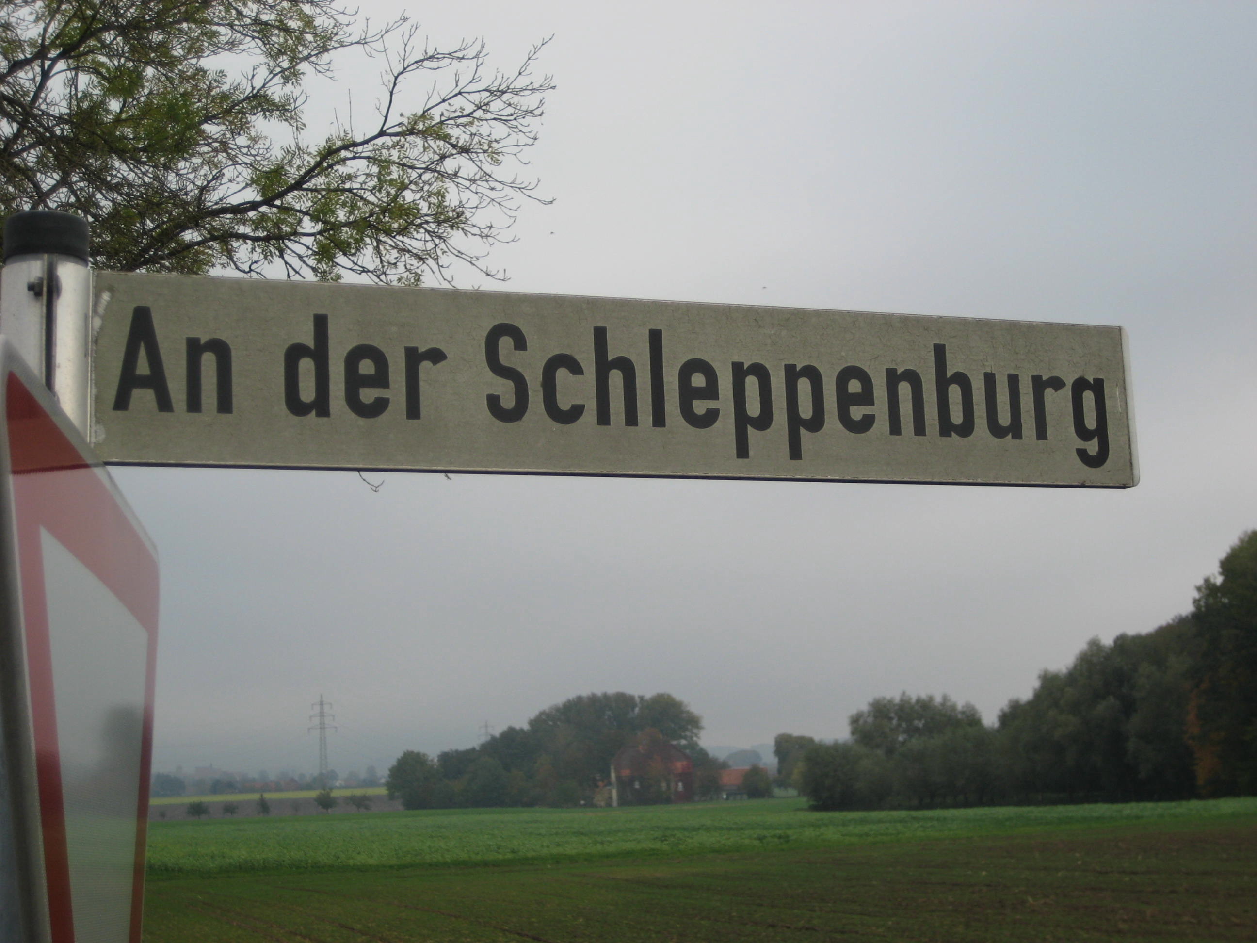 Straßenschild als Hinweis auf die nicht mehr bestehende Schleppenburg in Bad Iburg, im Hintergrund Burg Scheventorf